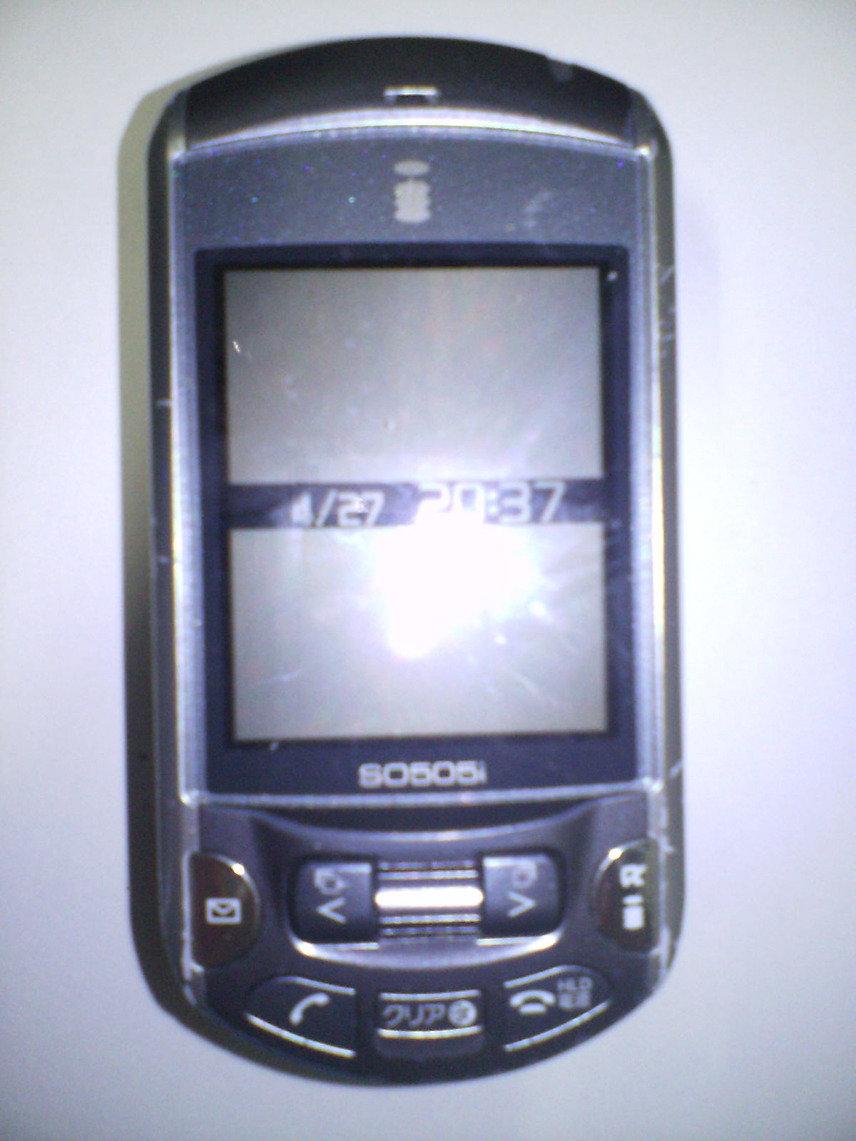 NTT DoCoMo mova So505i(Close)